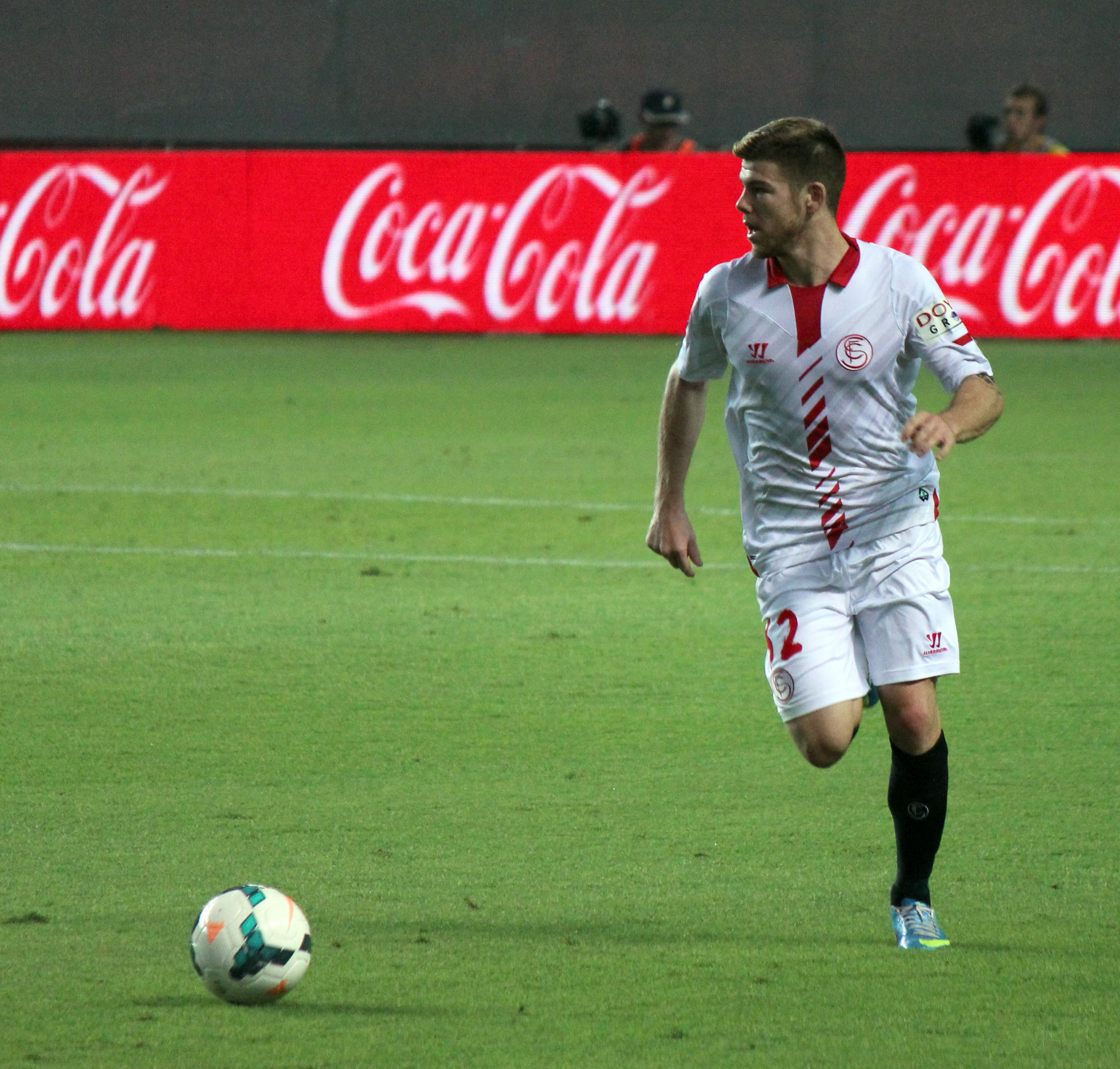 Futbolista del Sevilla FC